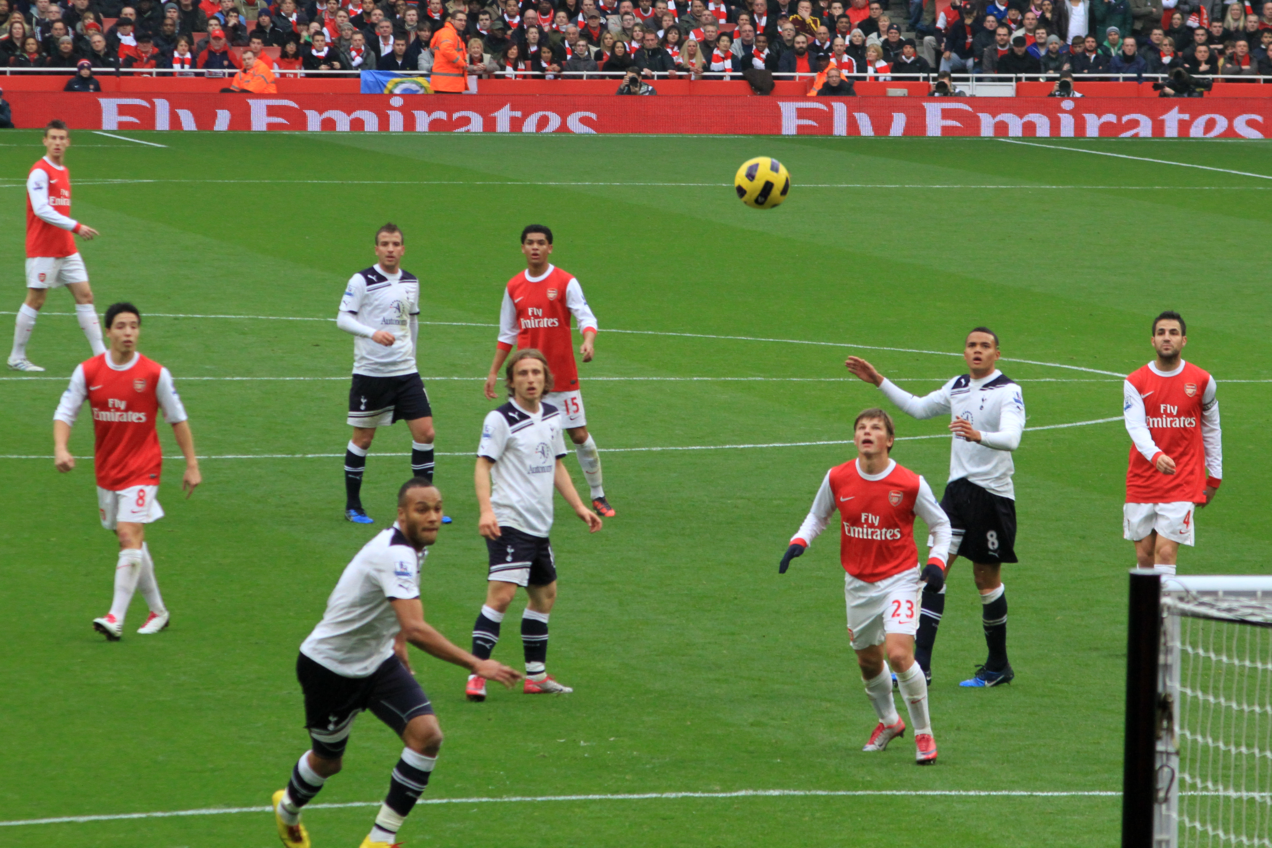 Arsenal attack! 2